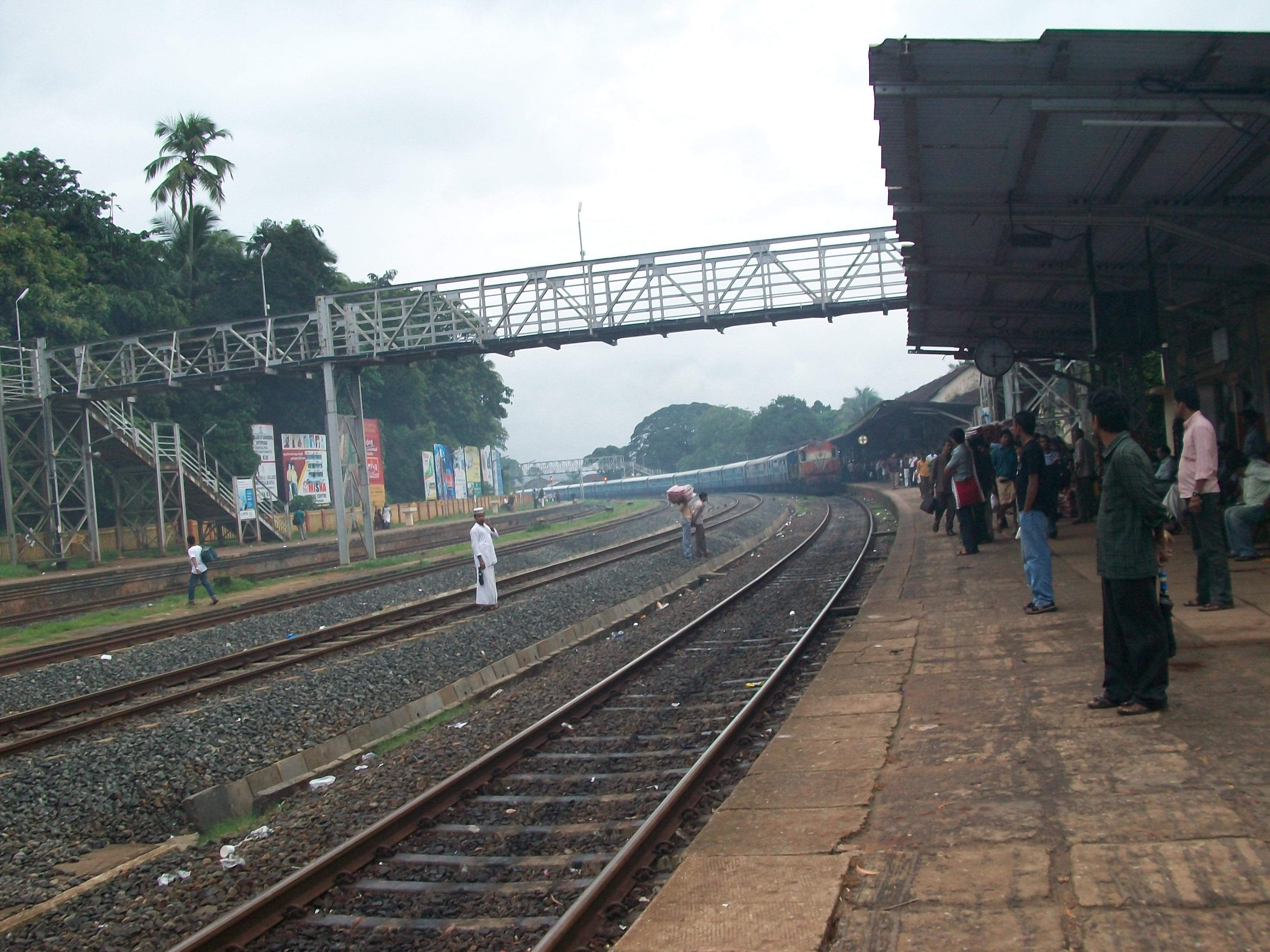 കുറ്റിപ്പുറം റയിൽ‌വേ സ്റ്റേഷന്റെ ഒരു ദൃശ്യം